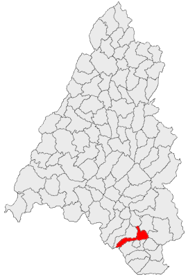 Categorie:Hărţi ale judeţului Bihor